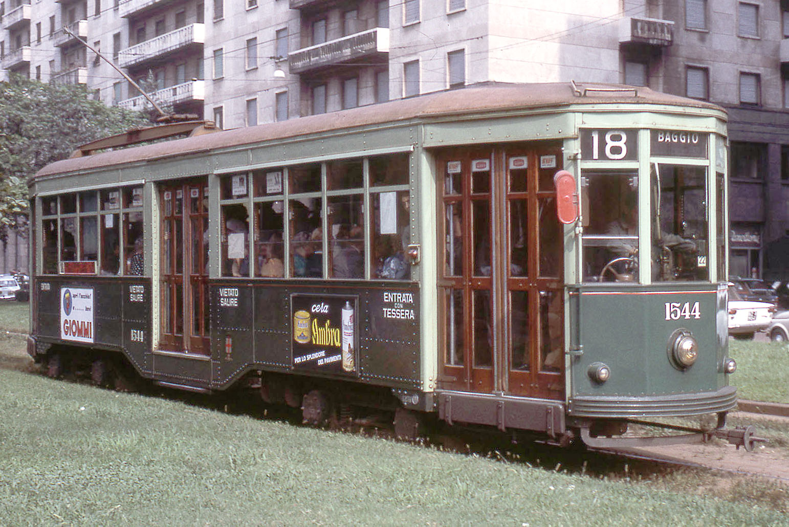 Vettura tranviaria 1544 dell'ATM di Milano in livrea a due toni di verde, in transito in piazza della Repubblica